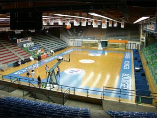 Salle du gymnase du Prado